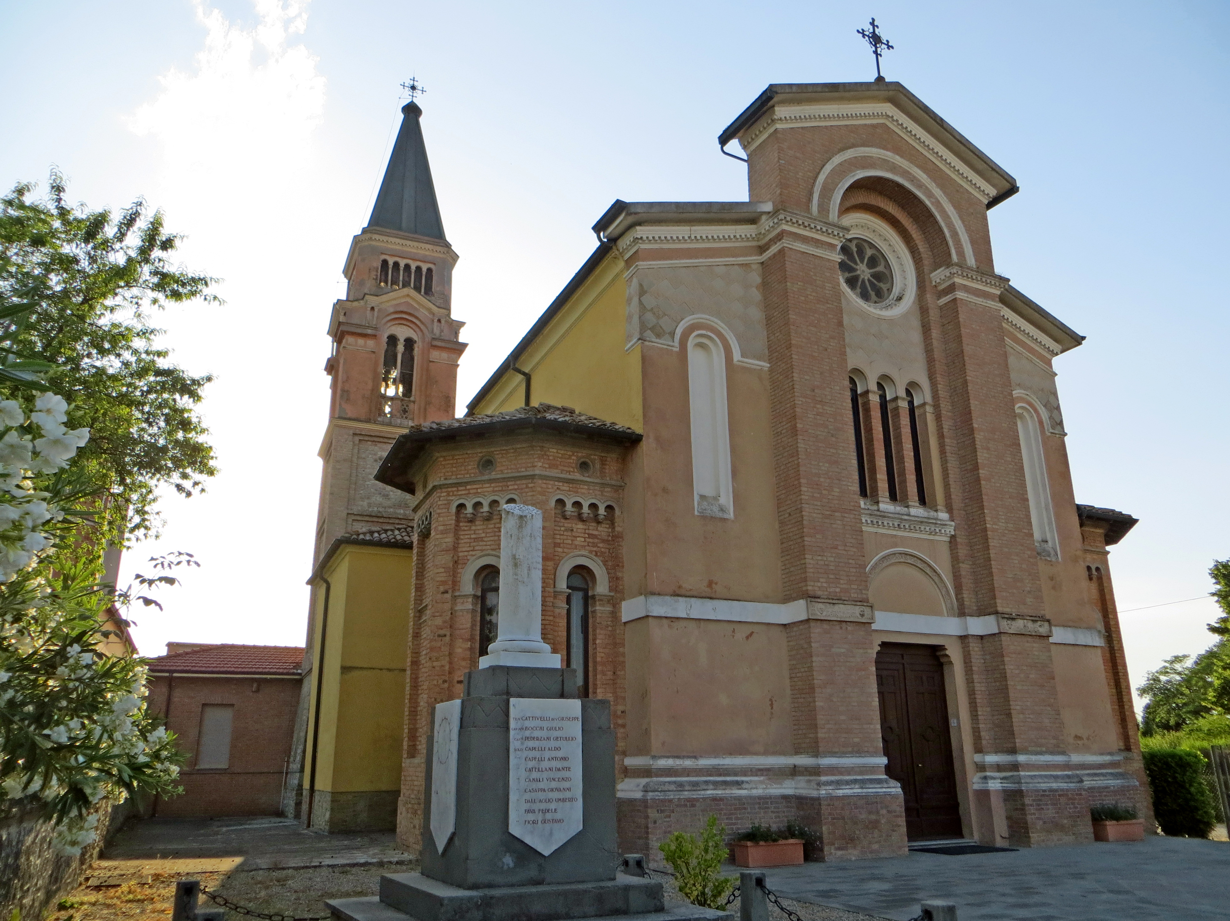 Chiesa di San Pietro (Porporano, Parma) - facciata e lato sud